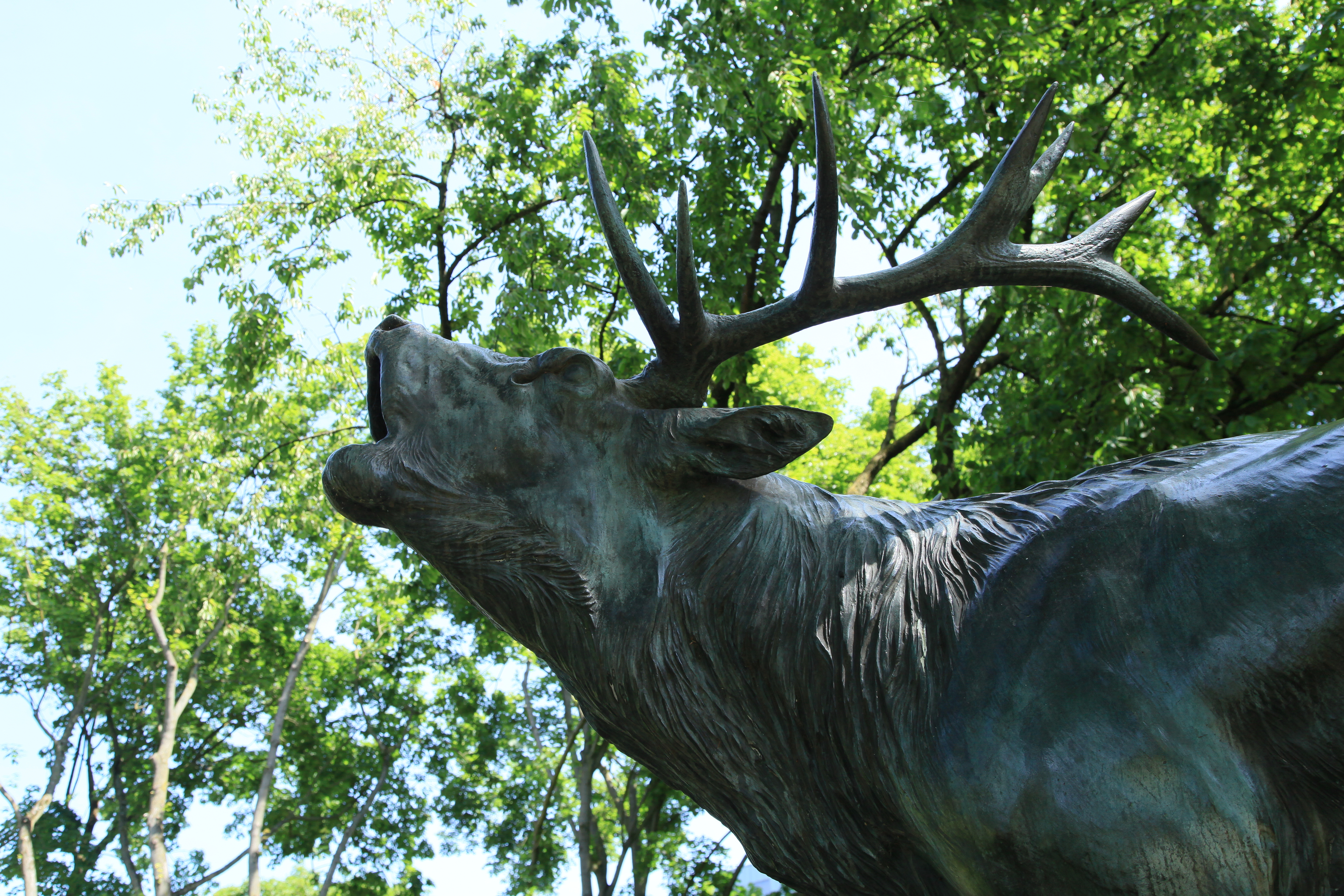 "Röhrender Hirsch" von Josef Pallenberg, Hofgarten in Düsseldorf